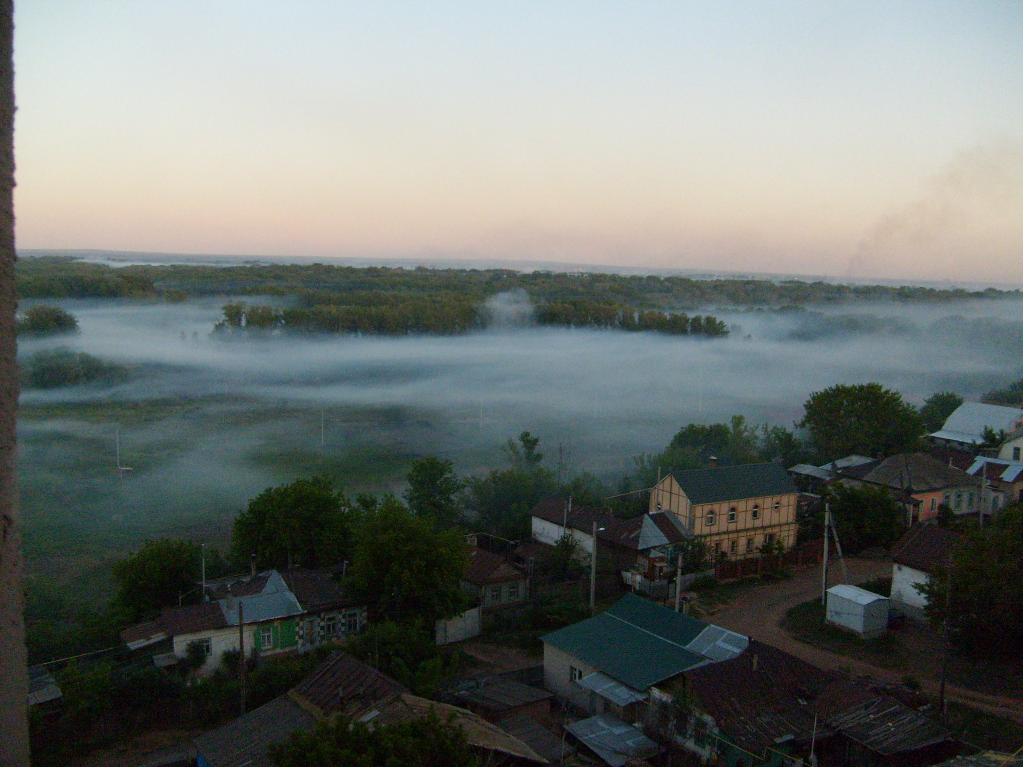 Туман в Оренурге на пойме Урала